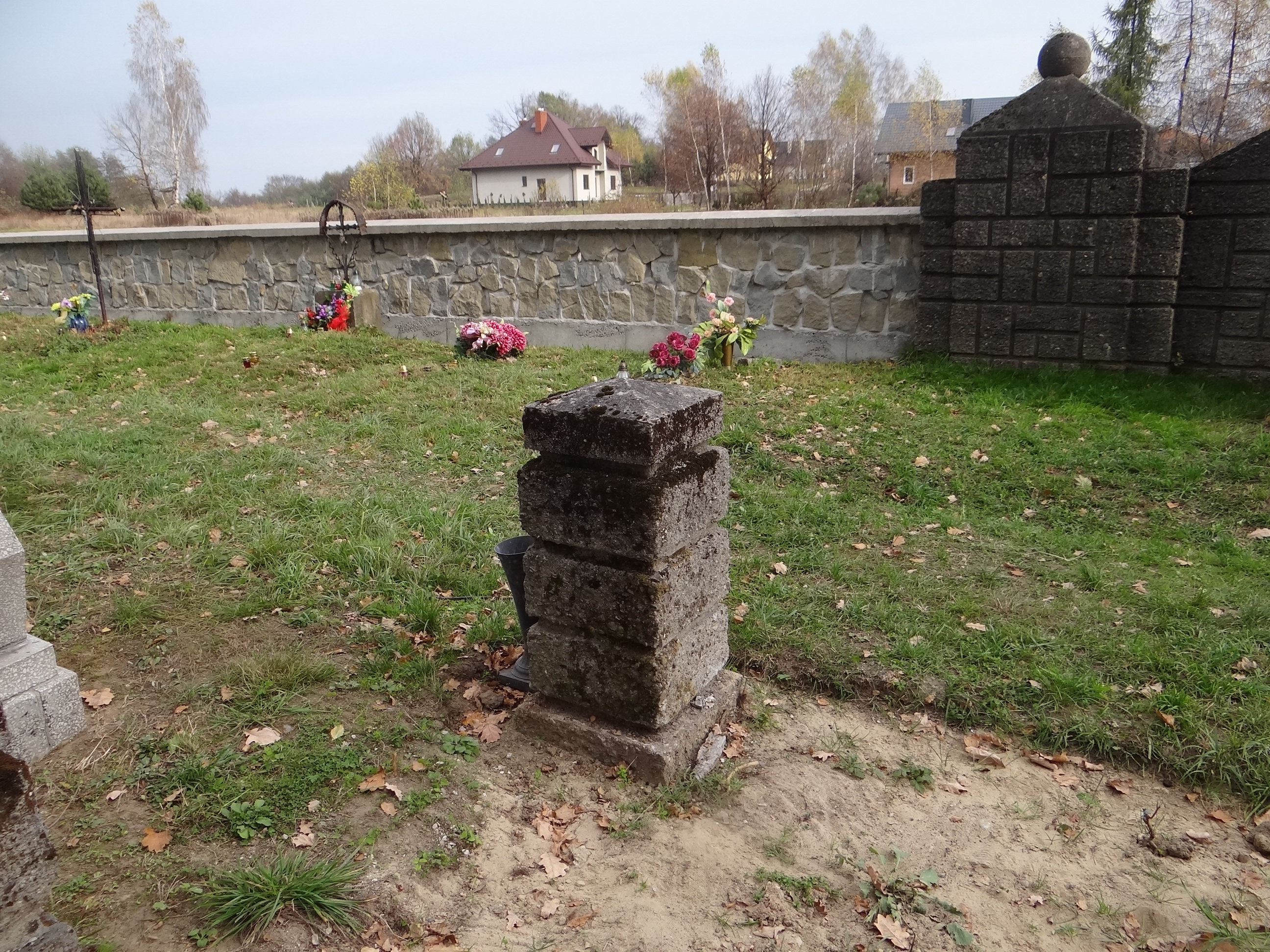 World War I Cemetery nr 273 in Szczepanów Cmentarz wojenny nr 273 - Szczepanów